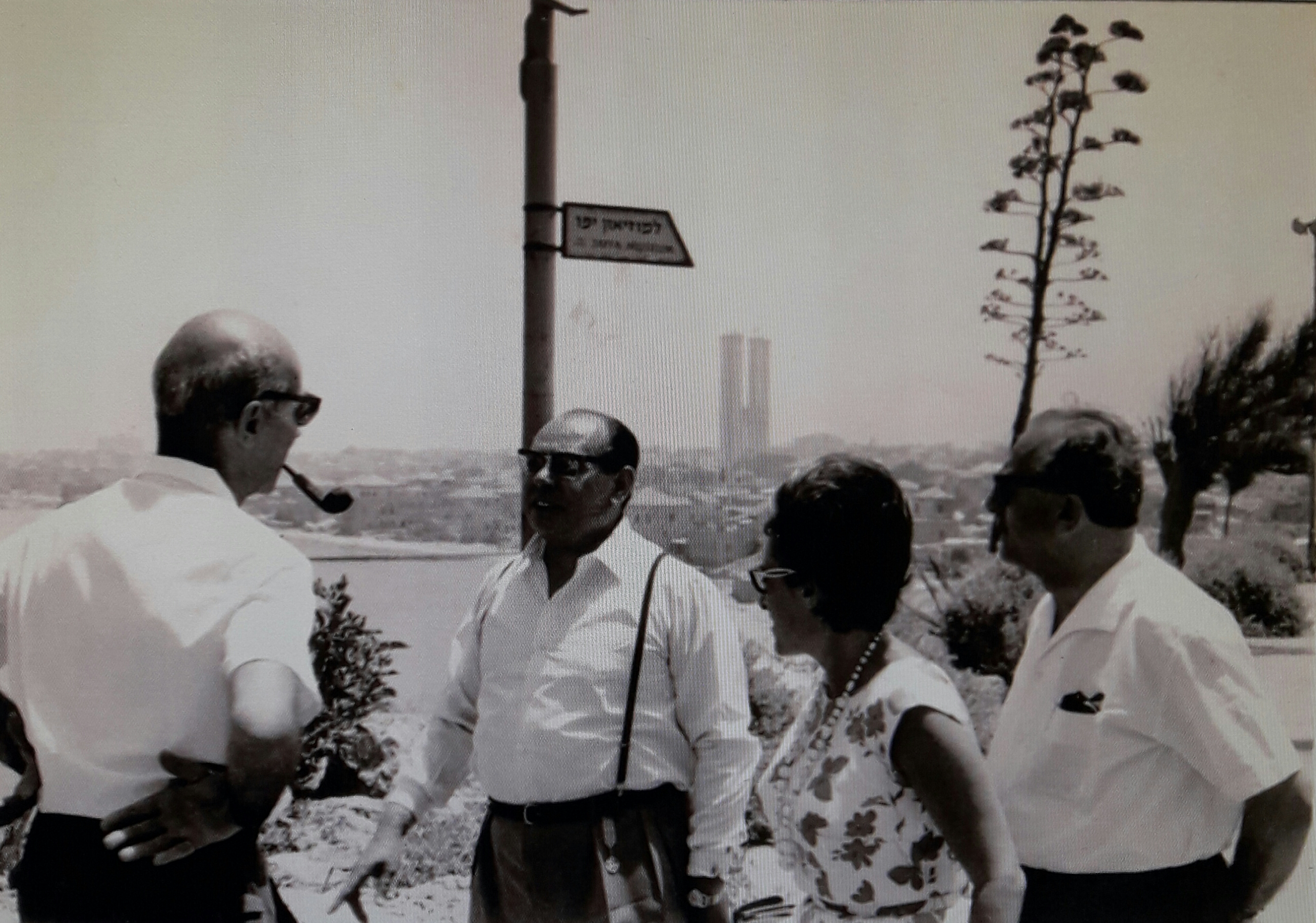 ביקורו של אצ'יו בארץ